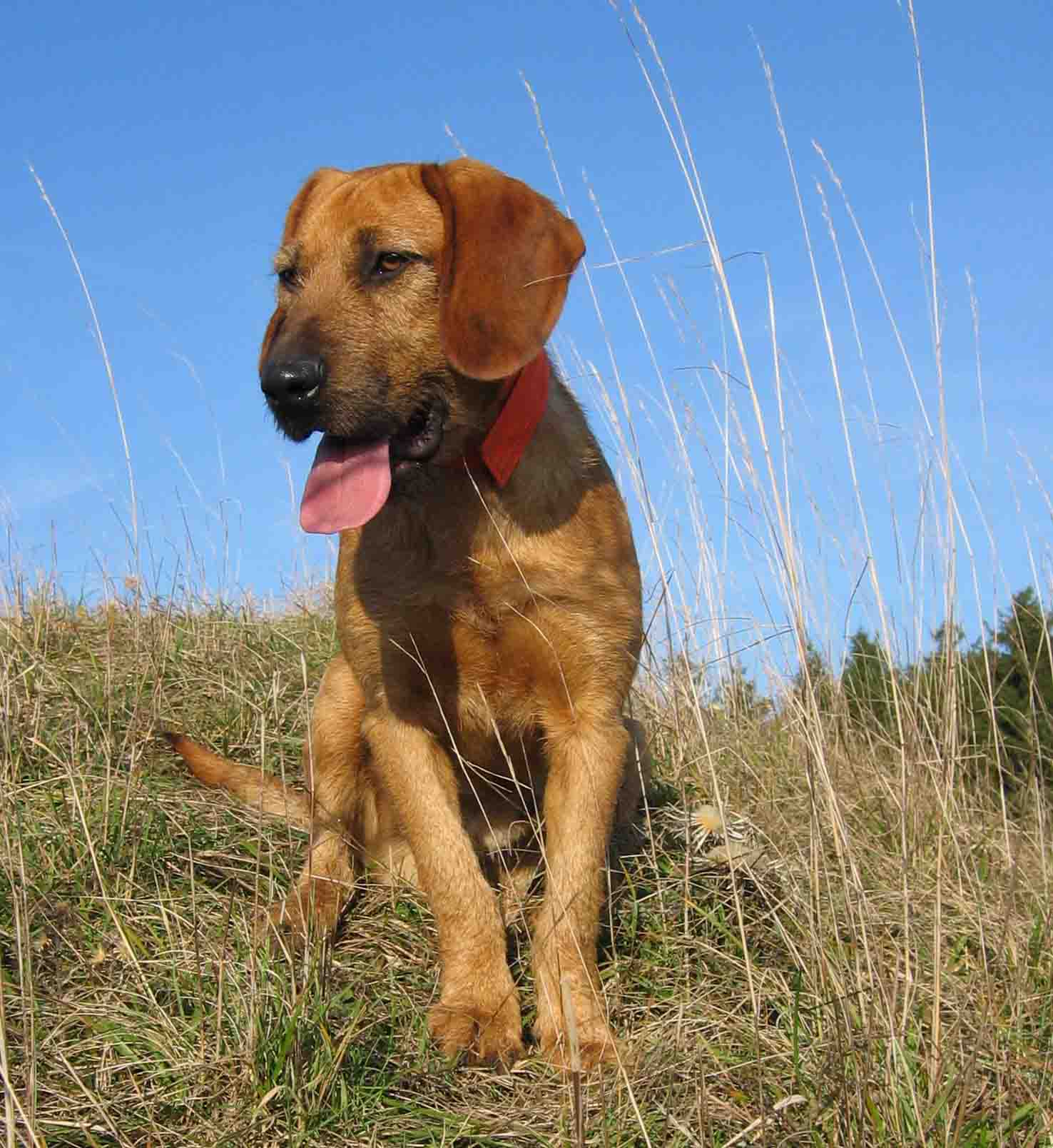 Steirische Rauhhaarbracke, ein halbes Jahr alt